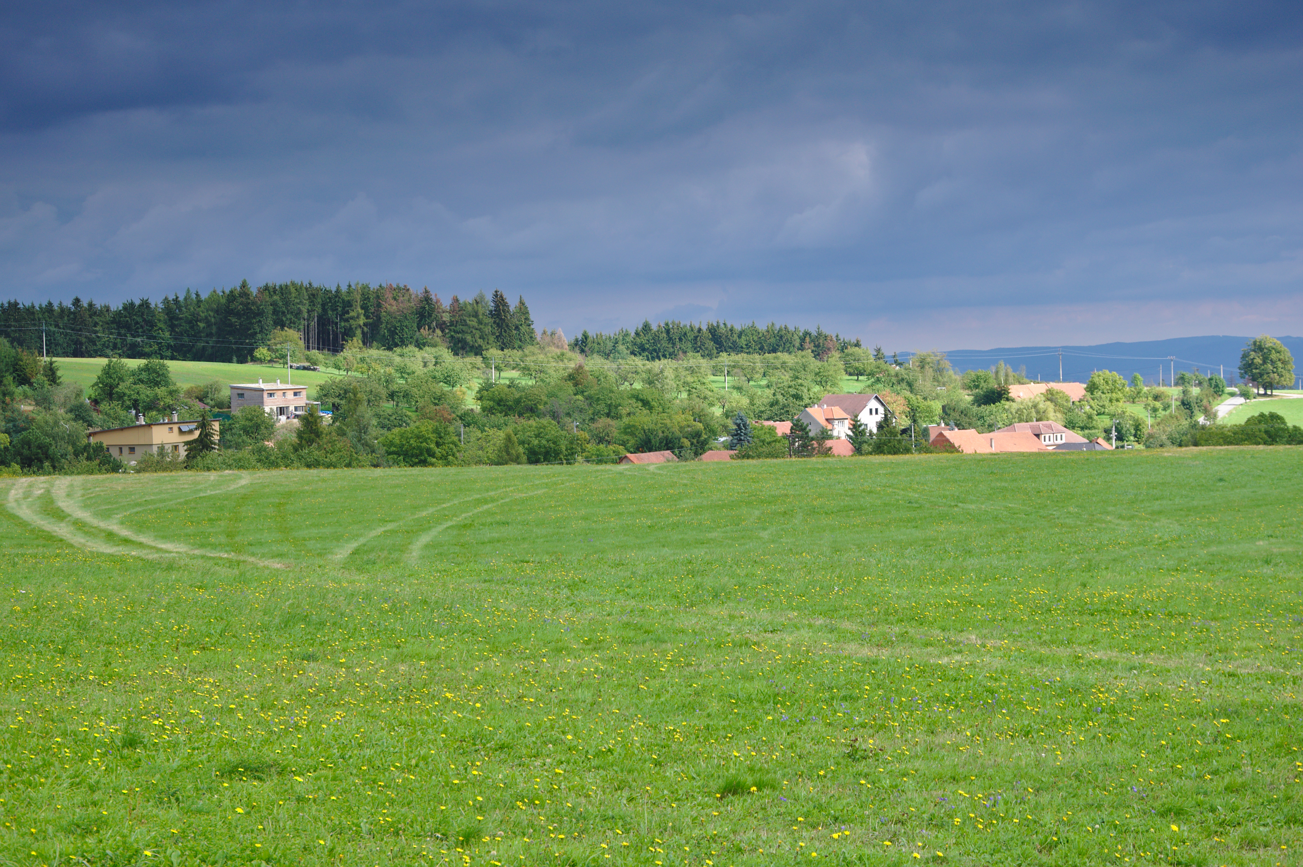 Pohled na obec od jihozápadu, Kunčina Ves, okres Blansko